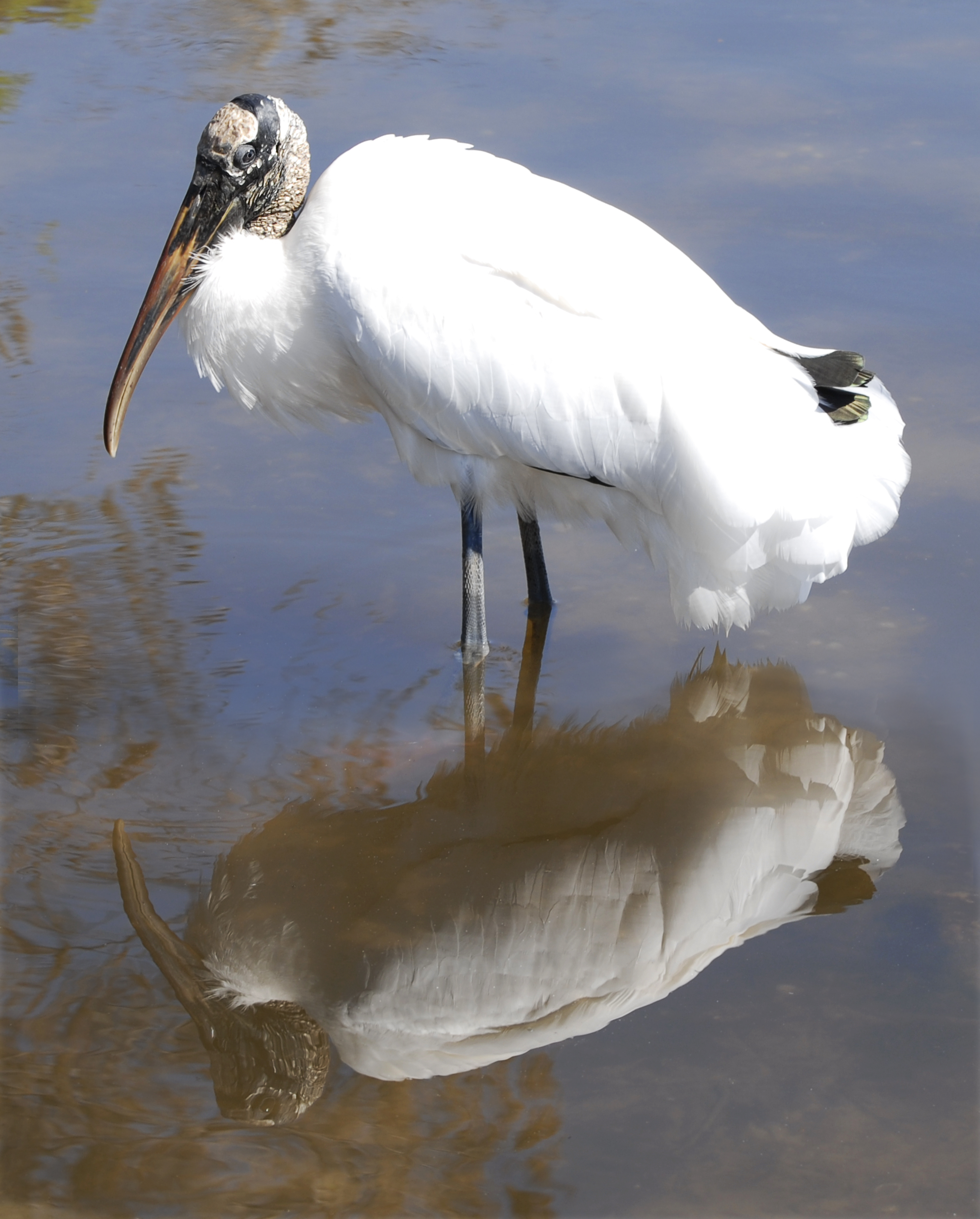 Woodstork